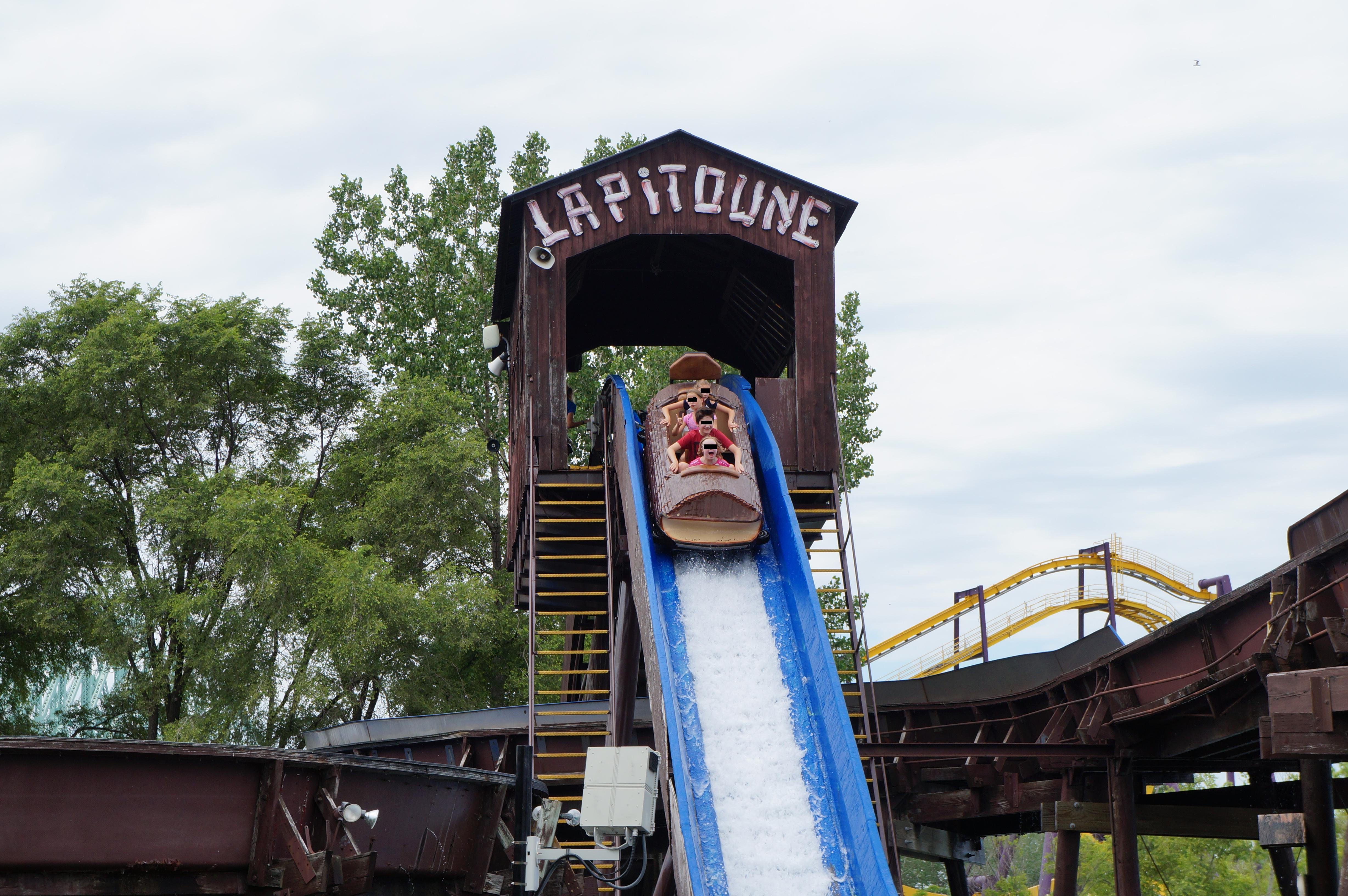 La Pitoune